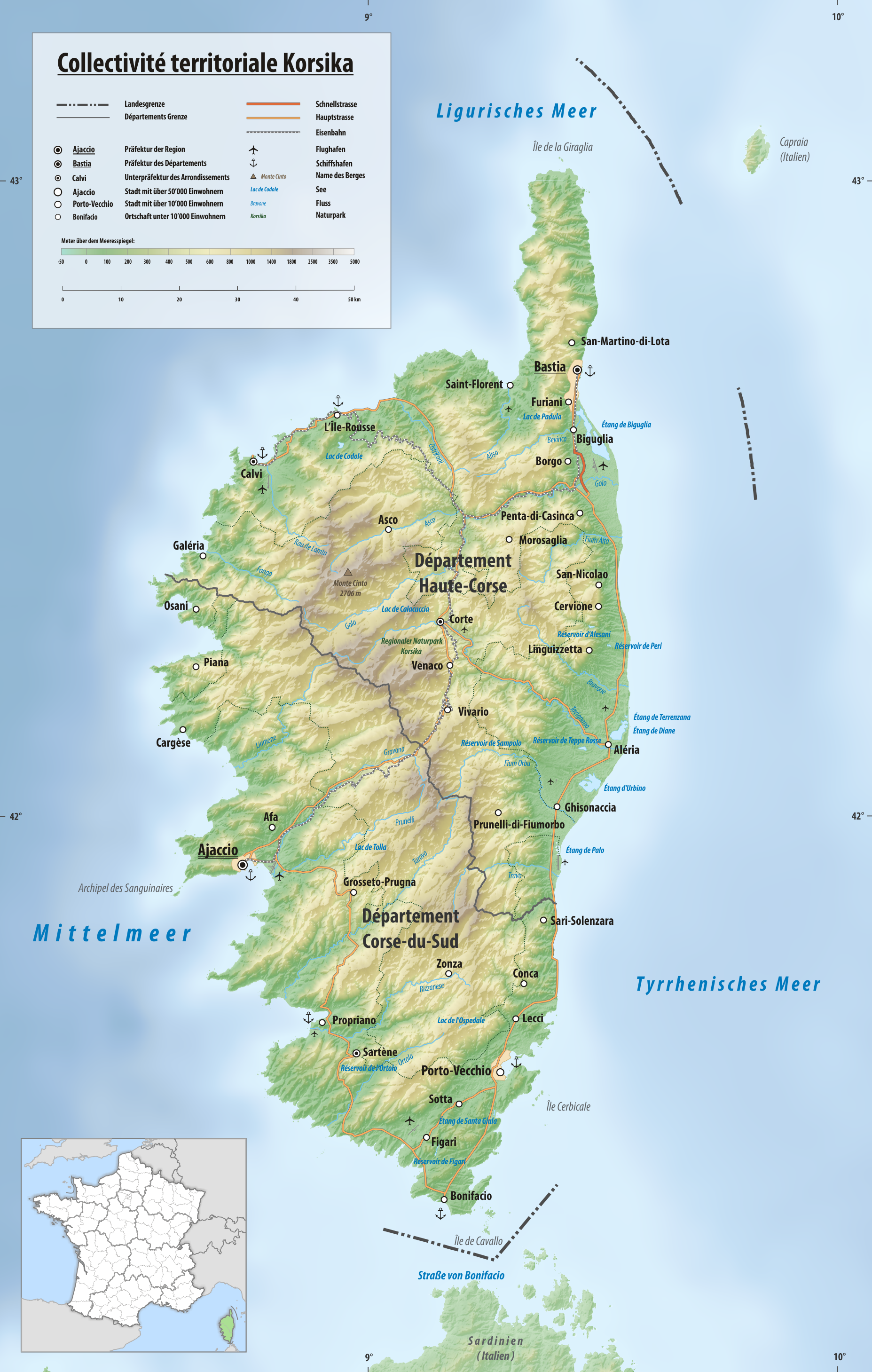 Reliefkarte der Region Korsika Topographischer Hintergrund: NASA Shuttle Radar Topography Mission (public domain). SRTM3 v.2.